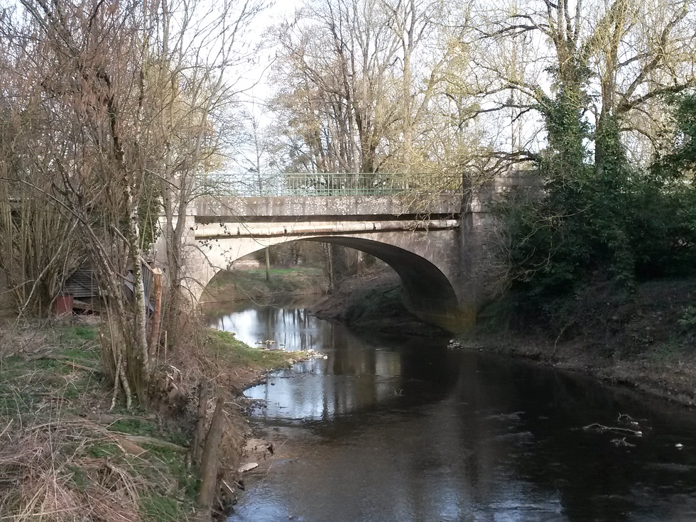 Pont du Gravereau sur la RD 137 franchissant le Petit-Lay entre les communes de Mouchamps et de Saint-Vincent-Sterlanges en Vendée.